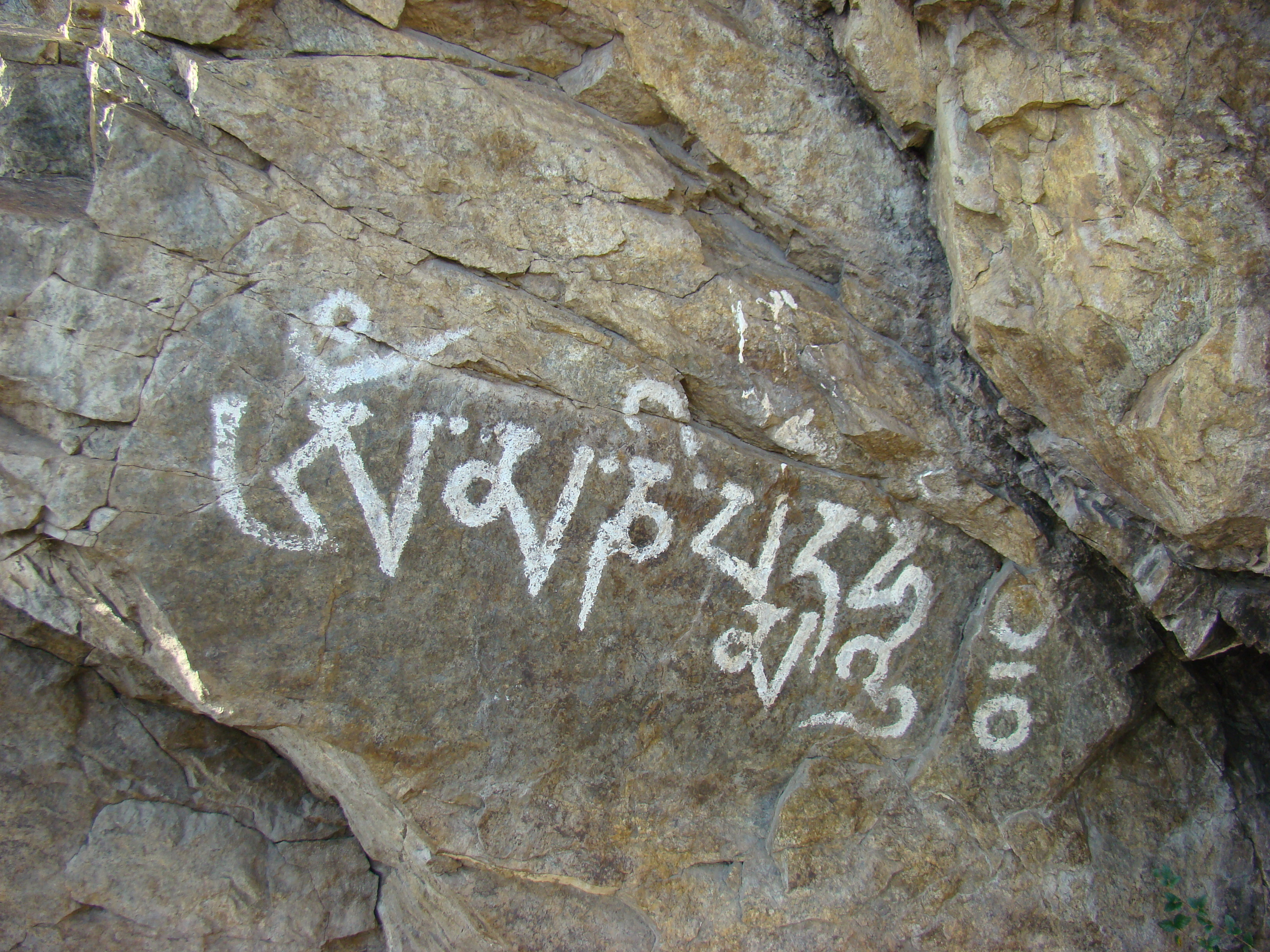 Наскальная надпись в местности Били